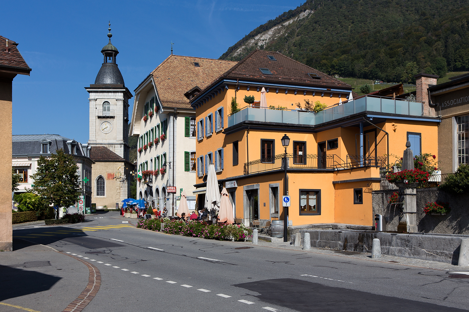 Zentrum von Ollon